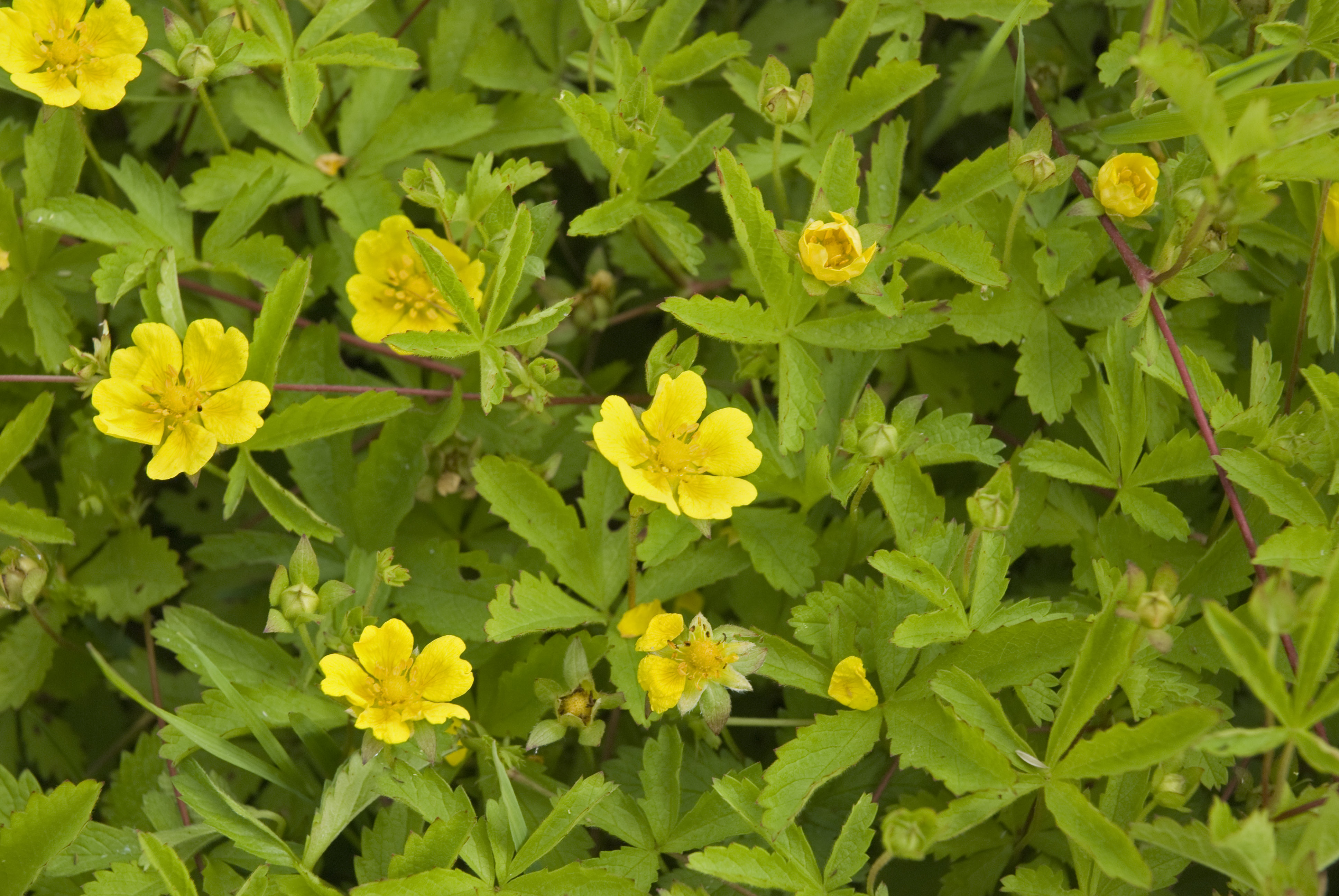 Potentilla reptans Carrière des sables de Bracheux à Beauvais (Oise), France